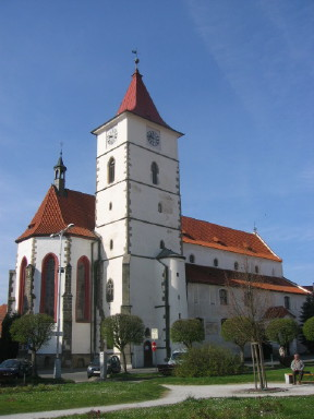 Preĝejo en Horažďovice